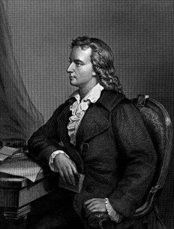 retournement de l'image Friedrich Schiller2.jpg de Commons